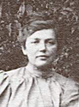 Berta Havlíčková-Liebscherová, česká malířka, kreslířka a středoškolská profesorka